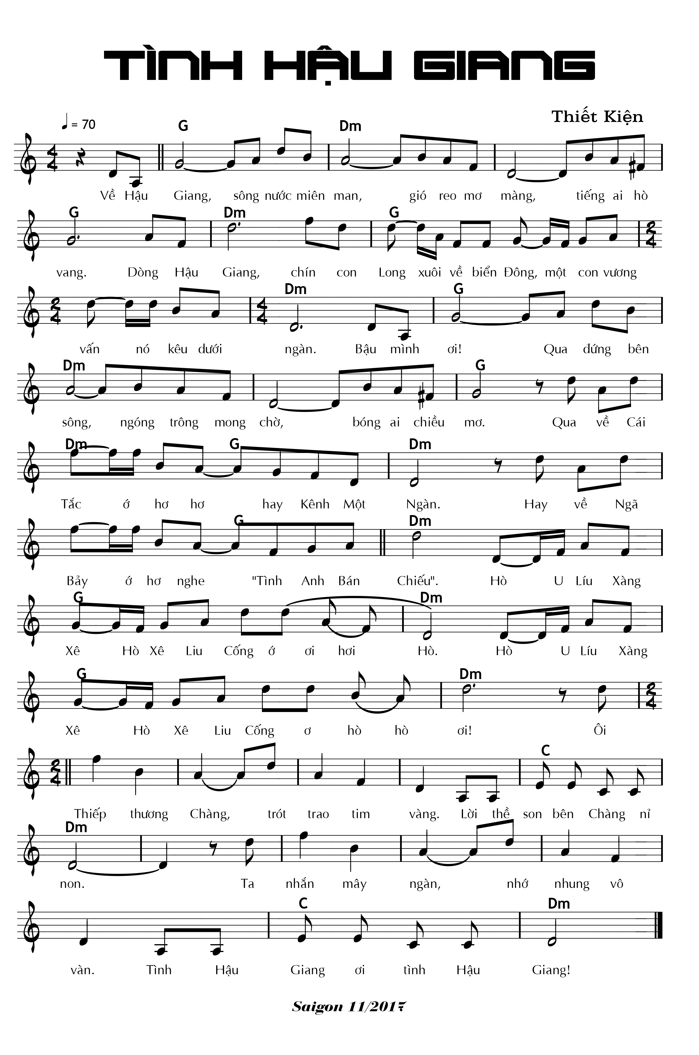 Viết cho người yêu ở Hậu Giang